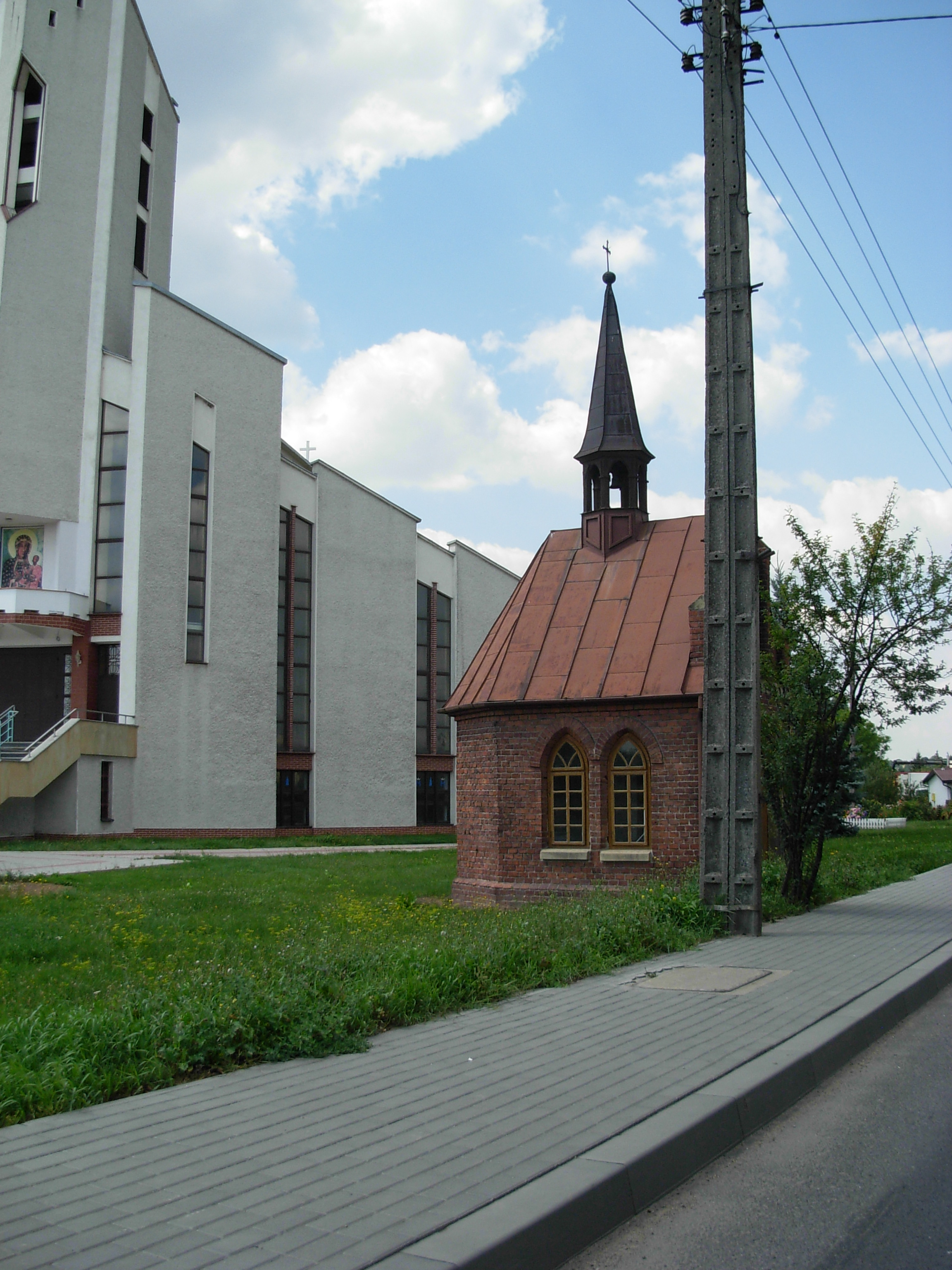 Sandomierz, Poland.